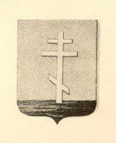 Герб Херсонского пикинерного полка русской армии, 1776-1784.